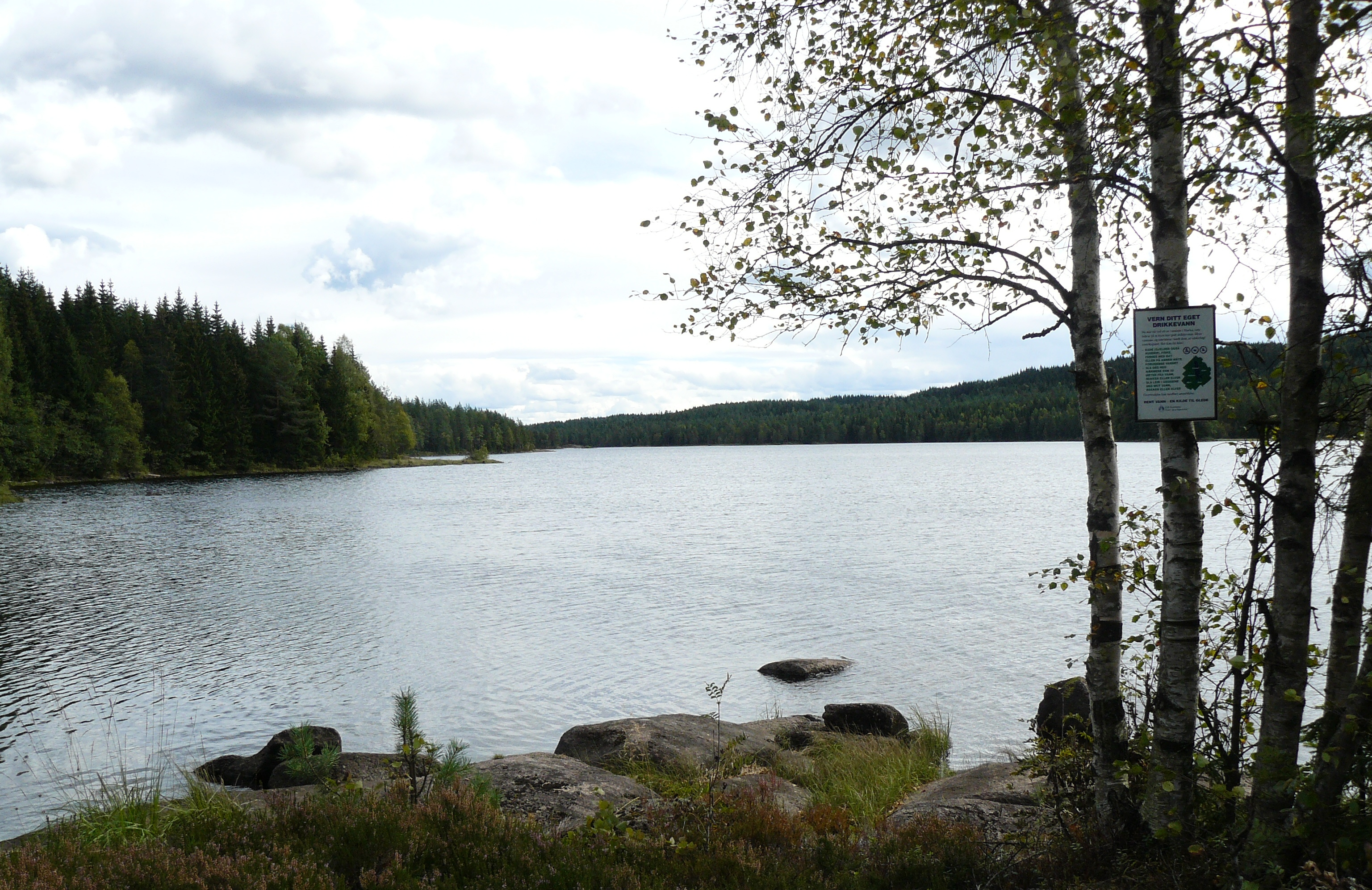 Skjærsjøen, Nordmarka